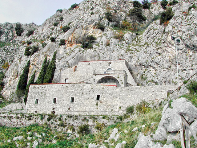 Eremo di San Michele, Foglianise (BN), Italia